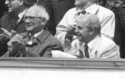 Erich Honecker und Herbert Naumann am 8. Mai 1987 auf der Ehrentribüne bei der Friedensfahrt in Berlin